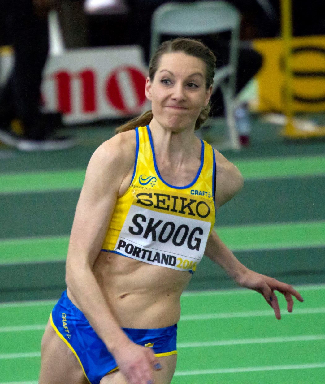 5128 skoog